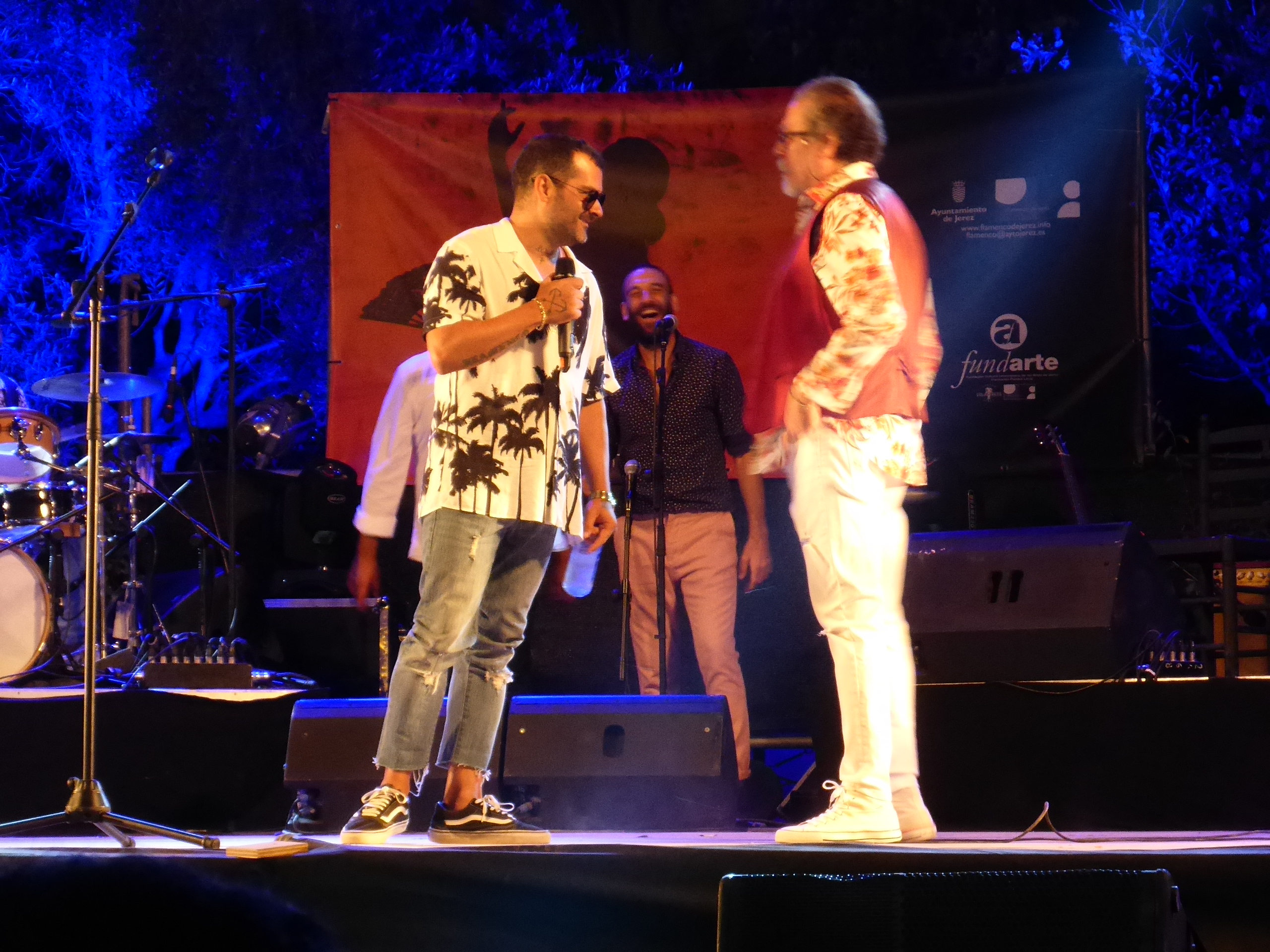 Junior Concierto del espectáculo "Hippitano" de Diego Carrasco en las Noches de Bohemia Fundador 2018, Alcázar de Jerez de la Frontera (Andalucía, España)